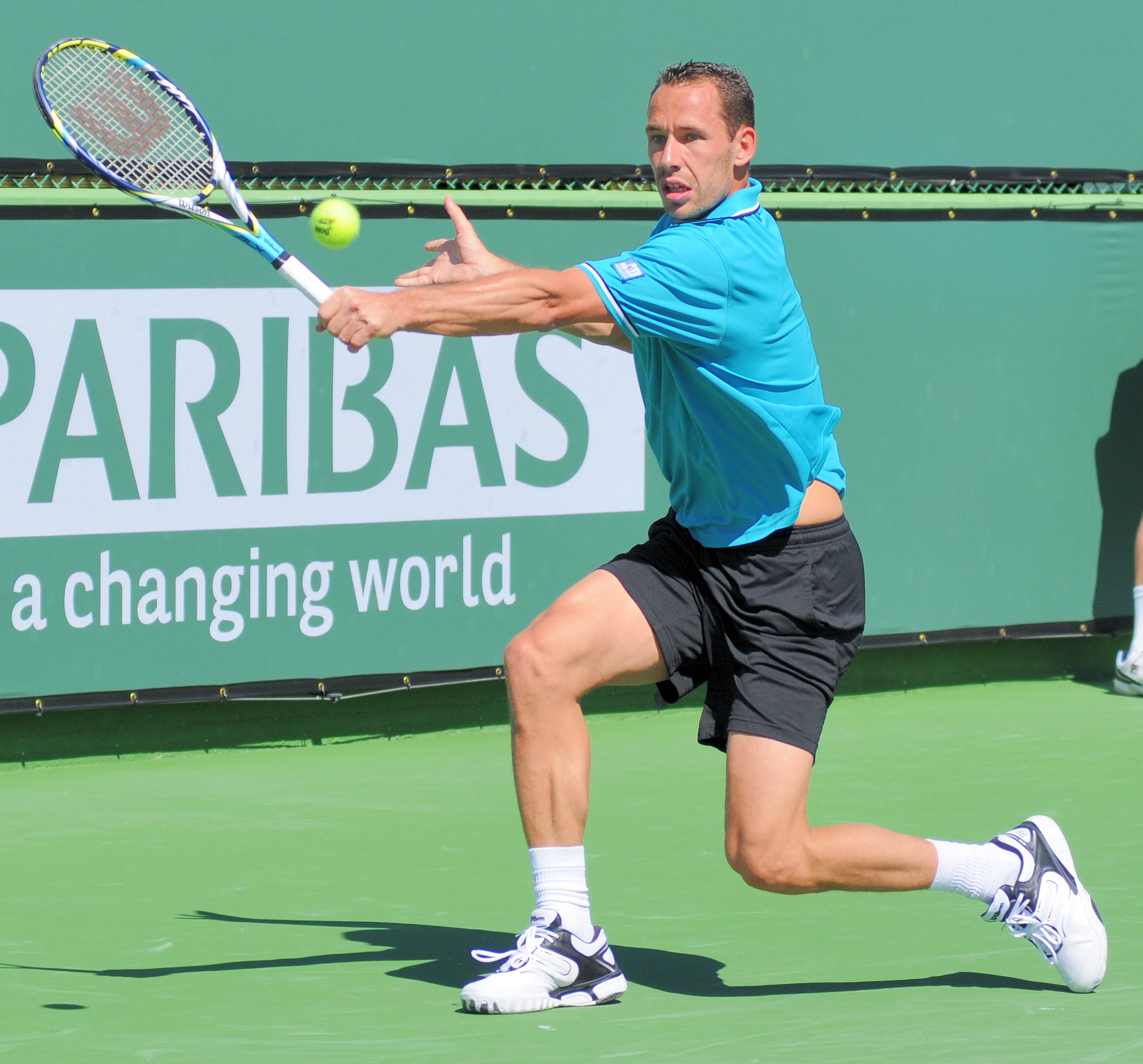 BNP Paribas Open 2012